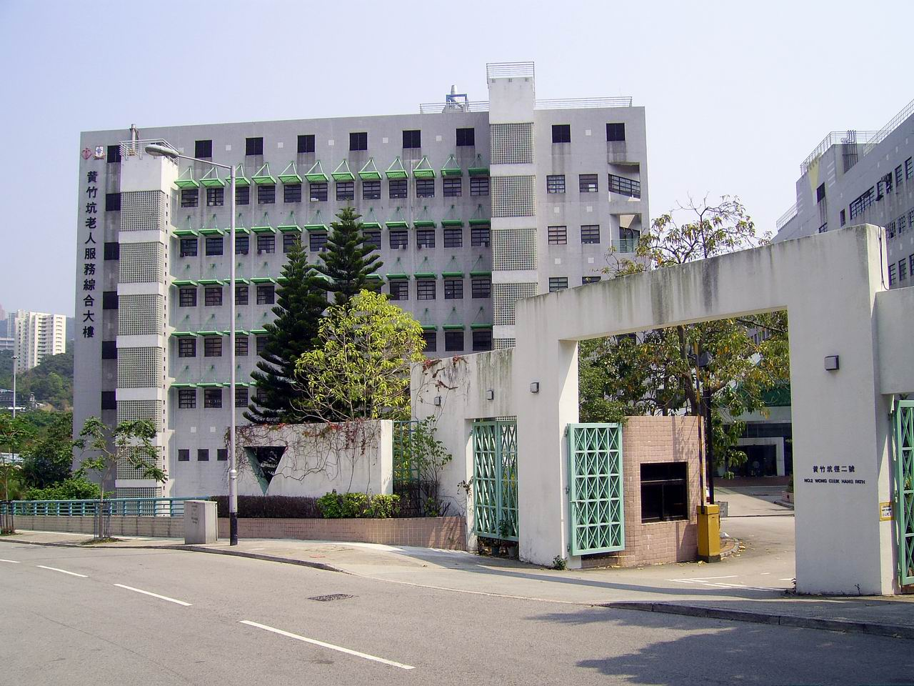 東華三院黃竹坑老人服務綜合大樓